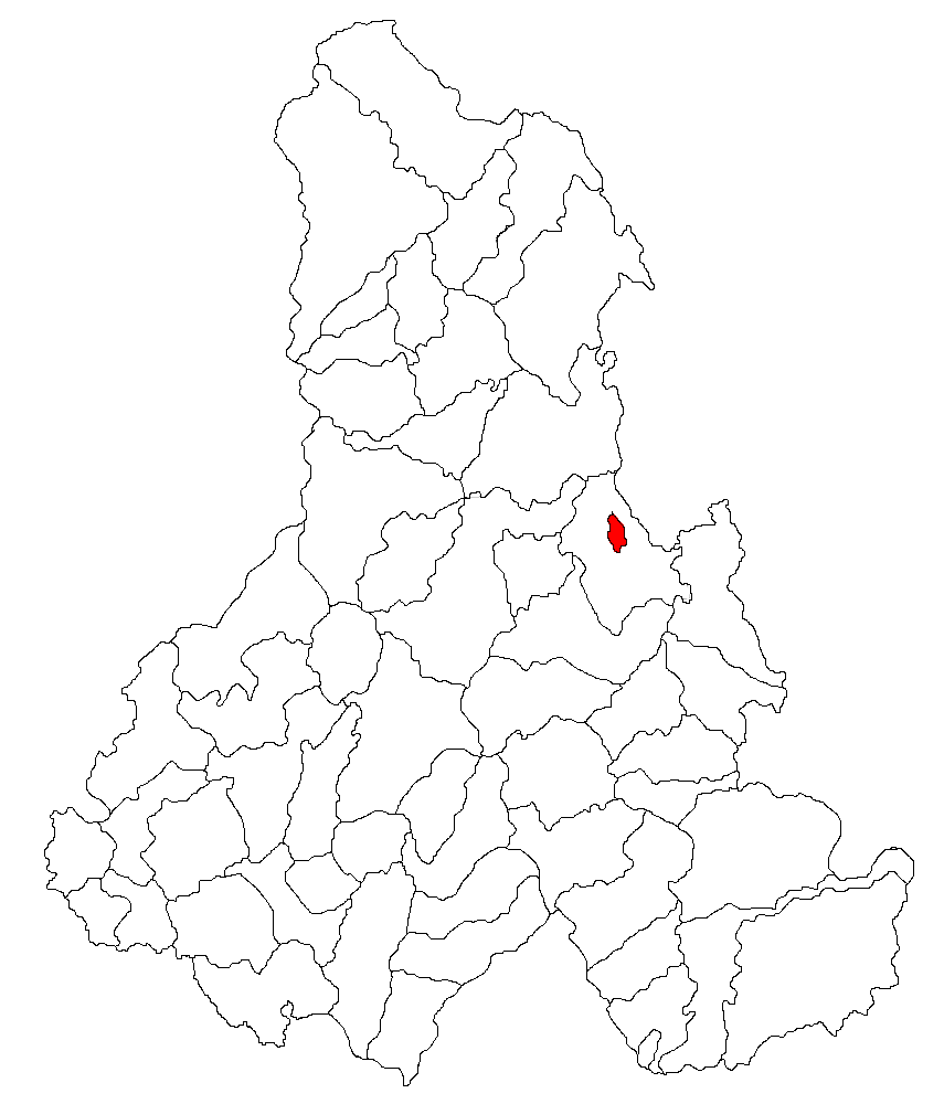 Categorie:Hărţi ale judeţului Harghita